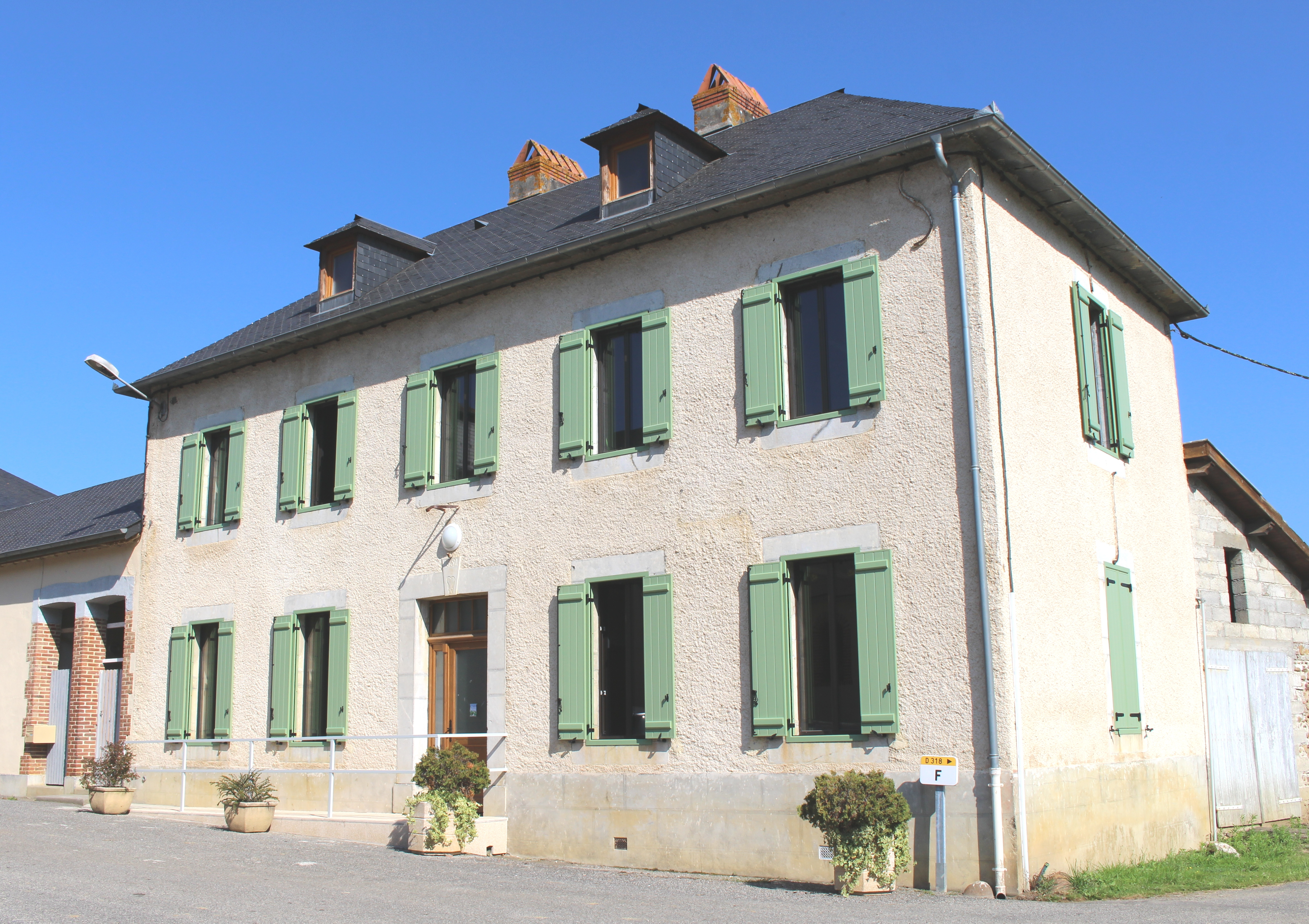 Mairie de Galez (Hautes-Pyrénées)